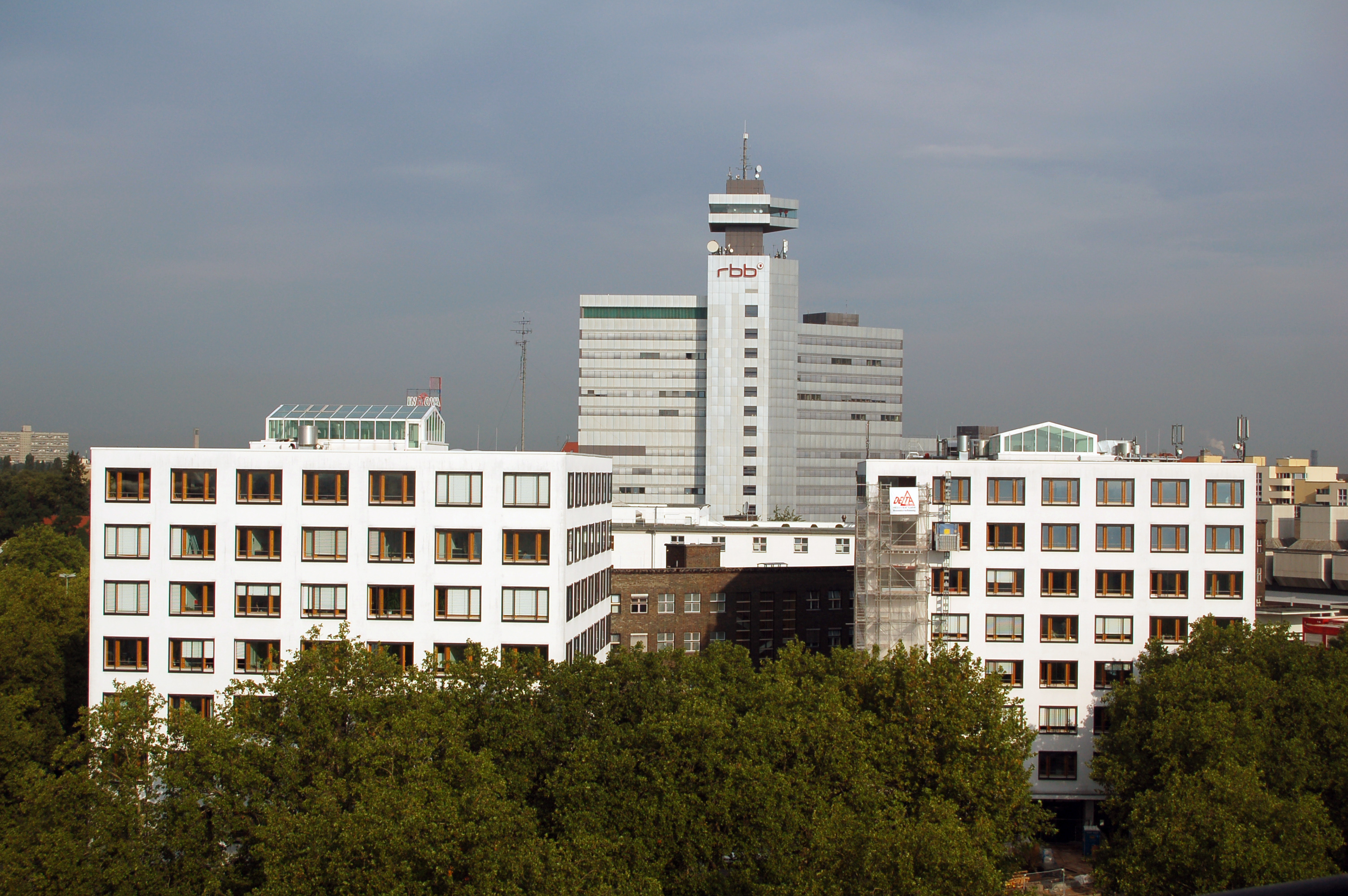 Gebäudekomplex des rbb (Rundfunk Berlin-Brandenburg) in Berlin zwischen Masurenallee, Theodor-Heuss-Platz und Kaiserdamm